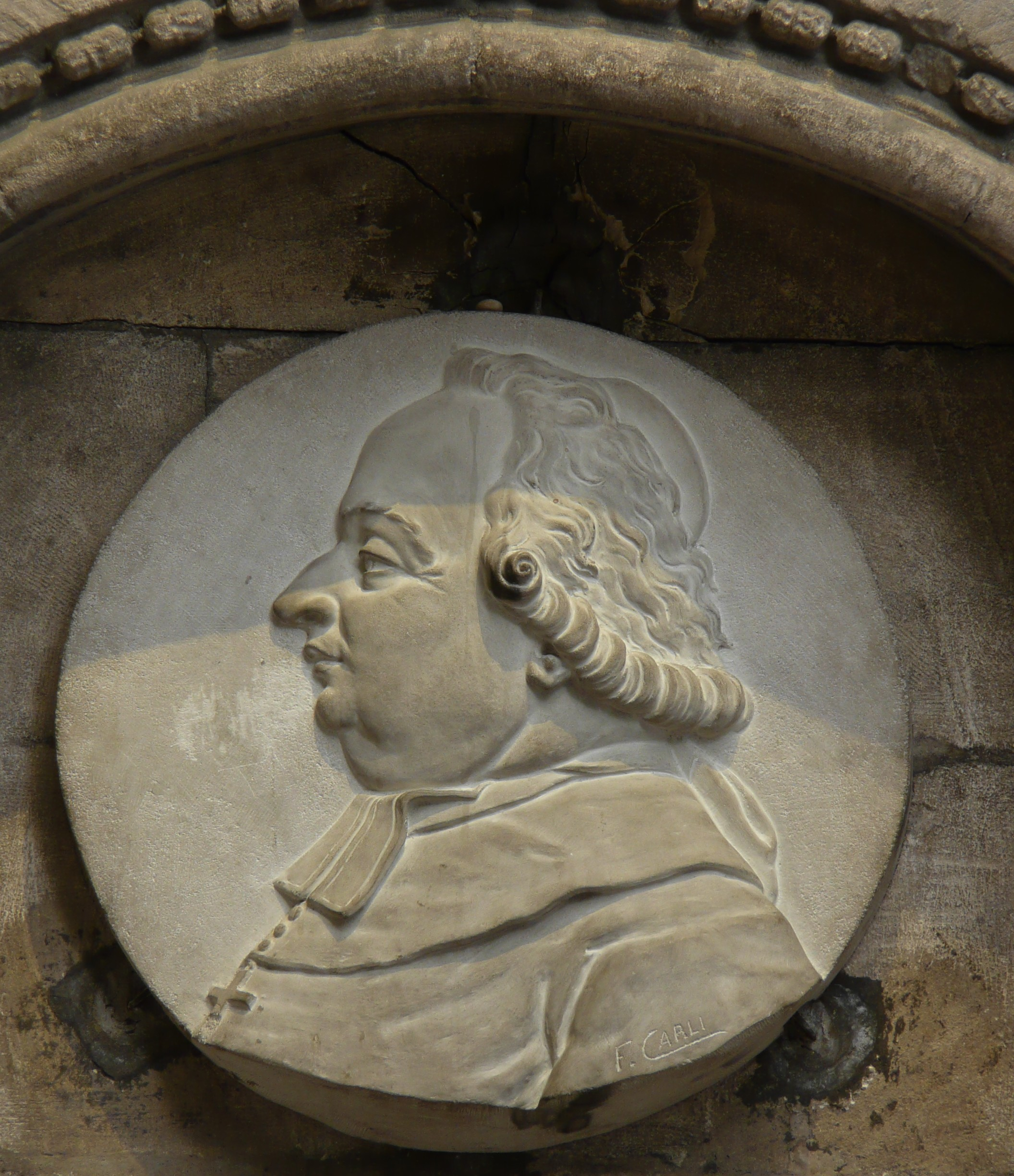 Arles (Bouches-du-Rhône, France), primatiale St Trophime, bas-relief en marbre en forme de médaillon, représentant le profil de Jean-Marie du Lau signé François Carli.